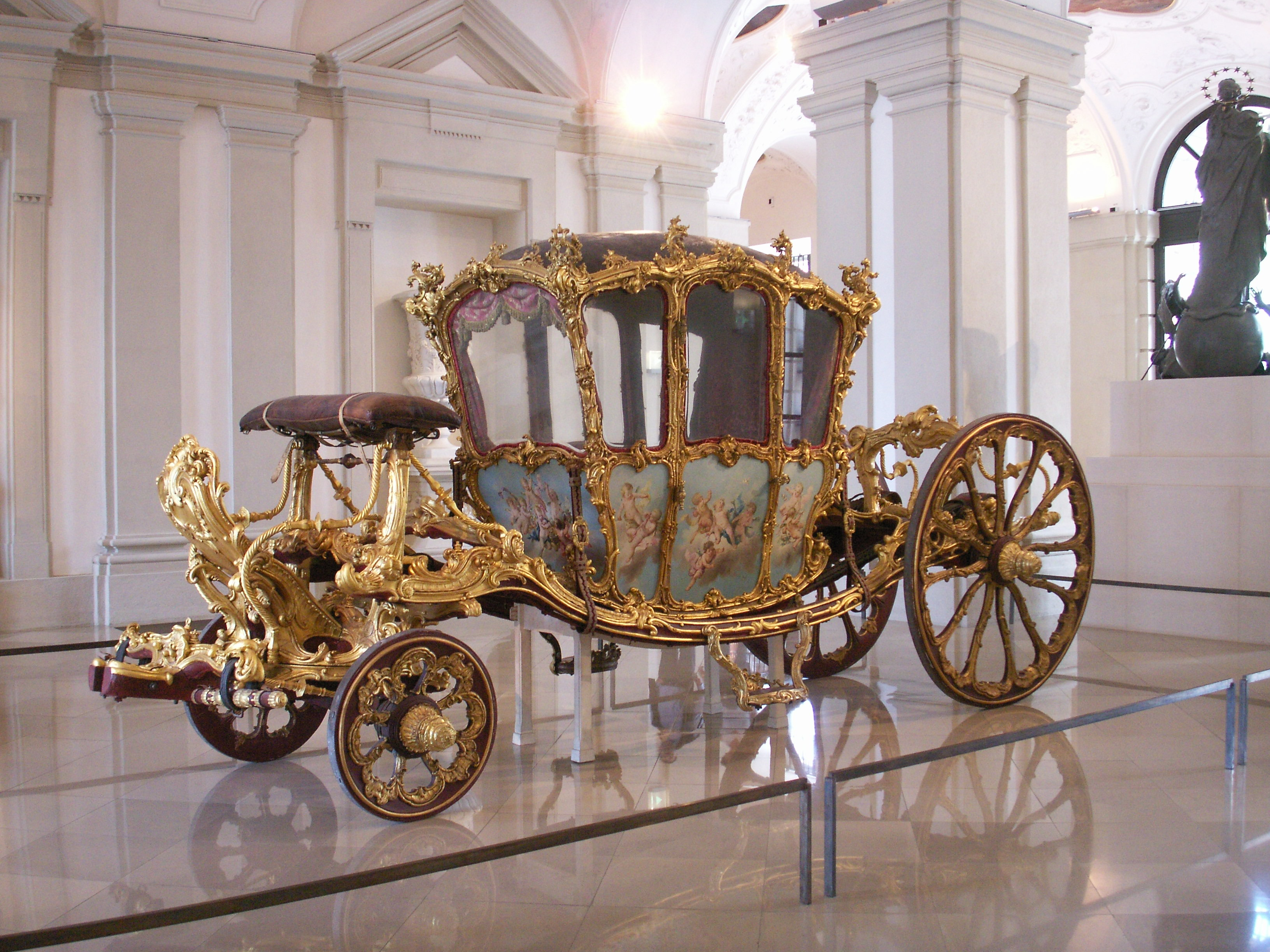 Nicolas Pineau. Der Goldene Wagen des Fürsten Joseph Wenzel I. von Liechtenstein, 1738. Holz, farbig gefasst und vergoldet, Stahl, vergoldete Bronze, Leder, Kristall, Samt mit Goldstickerei, Brokat Höhe 610 cm, Breite 213 cm, Tiefe 319 cm Inv.-Nr. SK1 Provenienz: 1738 erworben als Auftragswerk durch Fürst Joseph Wenzel von Liechtenstein für seinen Einzug als kaiserlicher Botschafter in Paris Ausgestellt in Sala Terrena